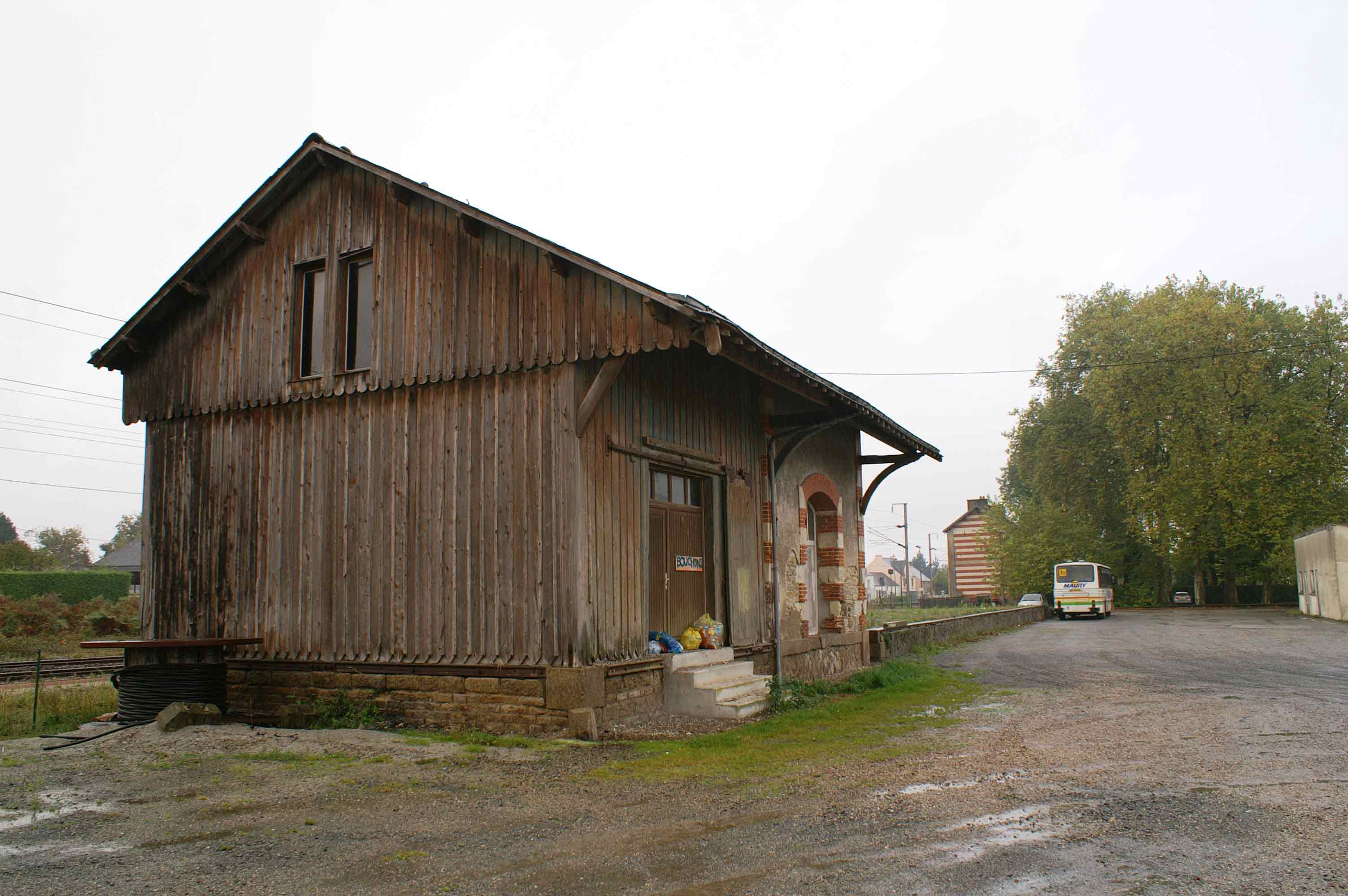 Façade bois de l'ancienne halle marchandises de la gare de Malansac.